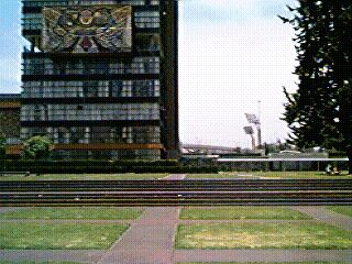 Torre de Rectoría y Mural de David Alfaro Siqueiros "Nuevo Emblema Universitario".